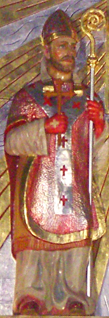 Święty Wojciech, rzeźba w nastawie ołtarza głównego kościoła Imienia Maryi w Bączalu Dolnym